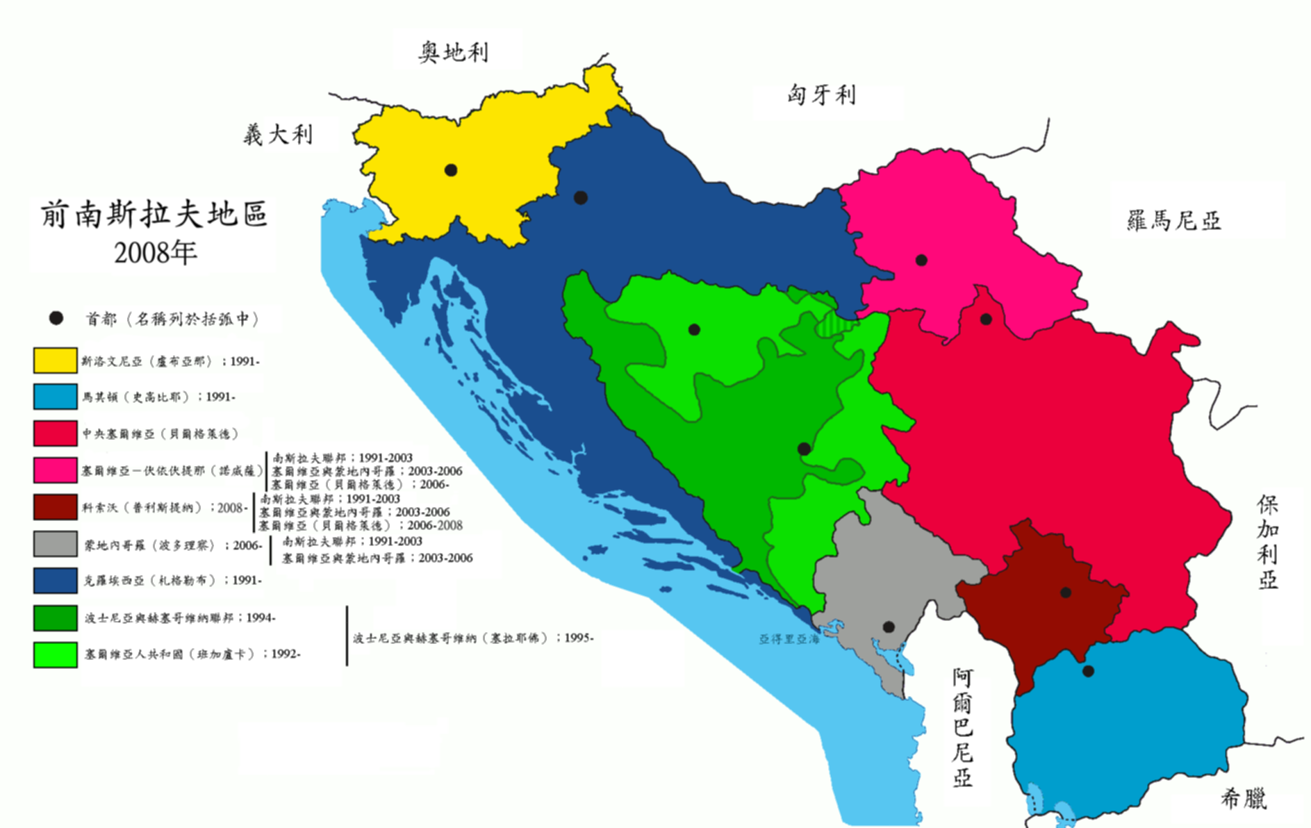 南斯拉夫地圖（加入科沃索資料）